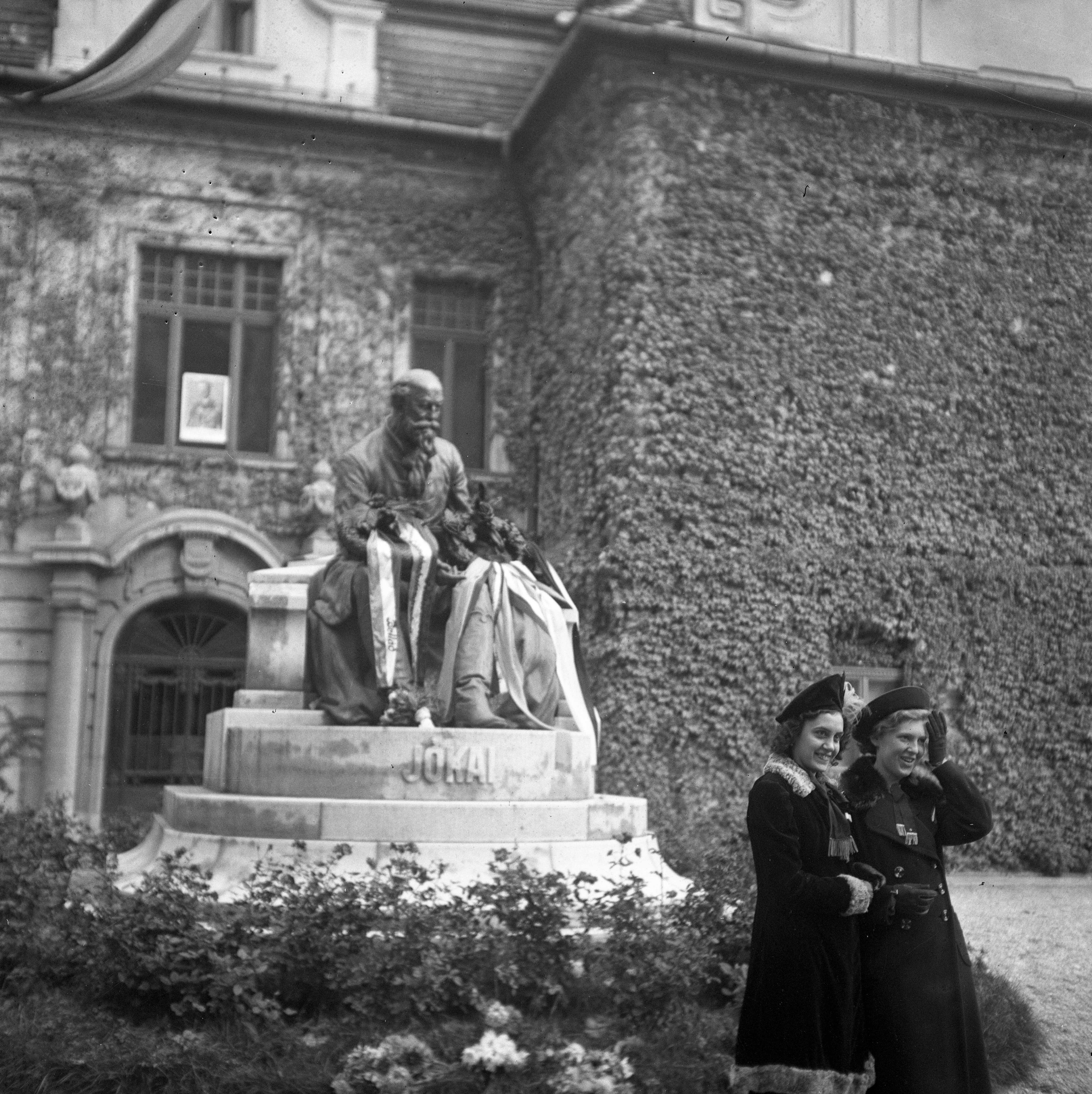 Jókai Mór szobra (Berecz Gyula, 1937.) a Duna Menti Múzeum (Kultúrpalota) előtt. Location: Slovakia, Komarno Tags: sculpture, Mór Jókai-portrayal Title: Jókai Mór szobra (Berecz Gyula, 1937.) a Duna Menti Múzeum (Kultúrpalota) előtt.